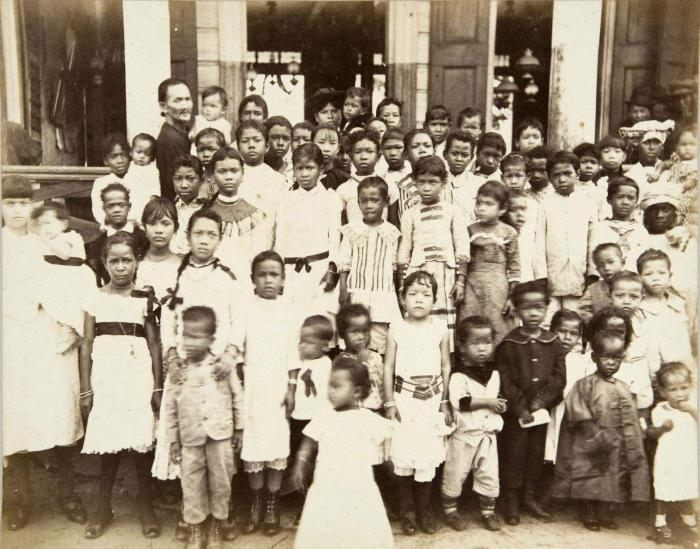 Foto. Portret van een groep kinderen van gemengde Chinese en Creoolse afkomst